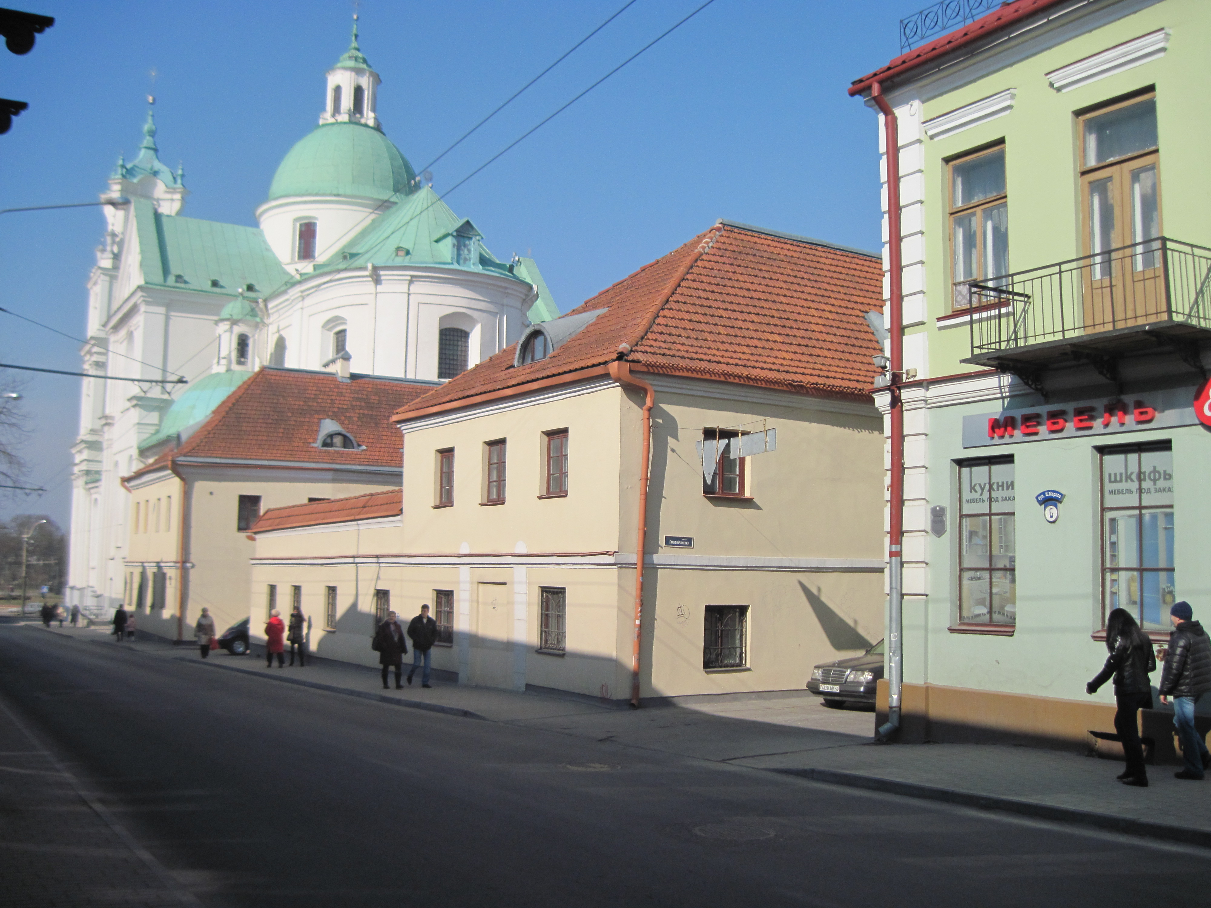 БУдынак па вуліцы К. Маркса, 4, у гістарычным цэнтры Гродна.